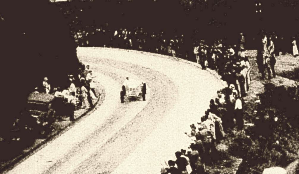 O piloto brasileiro disputando a corrida "Subida da Montanha" entre o Rio de Janeiro e Petrópolis, 1933.